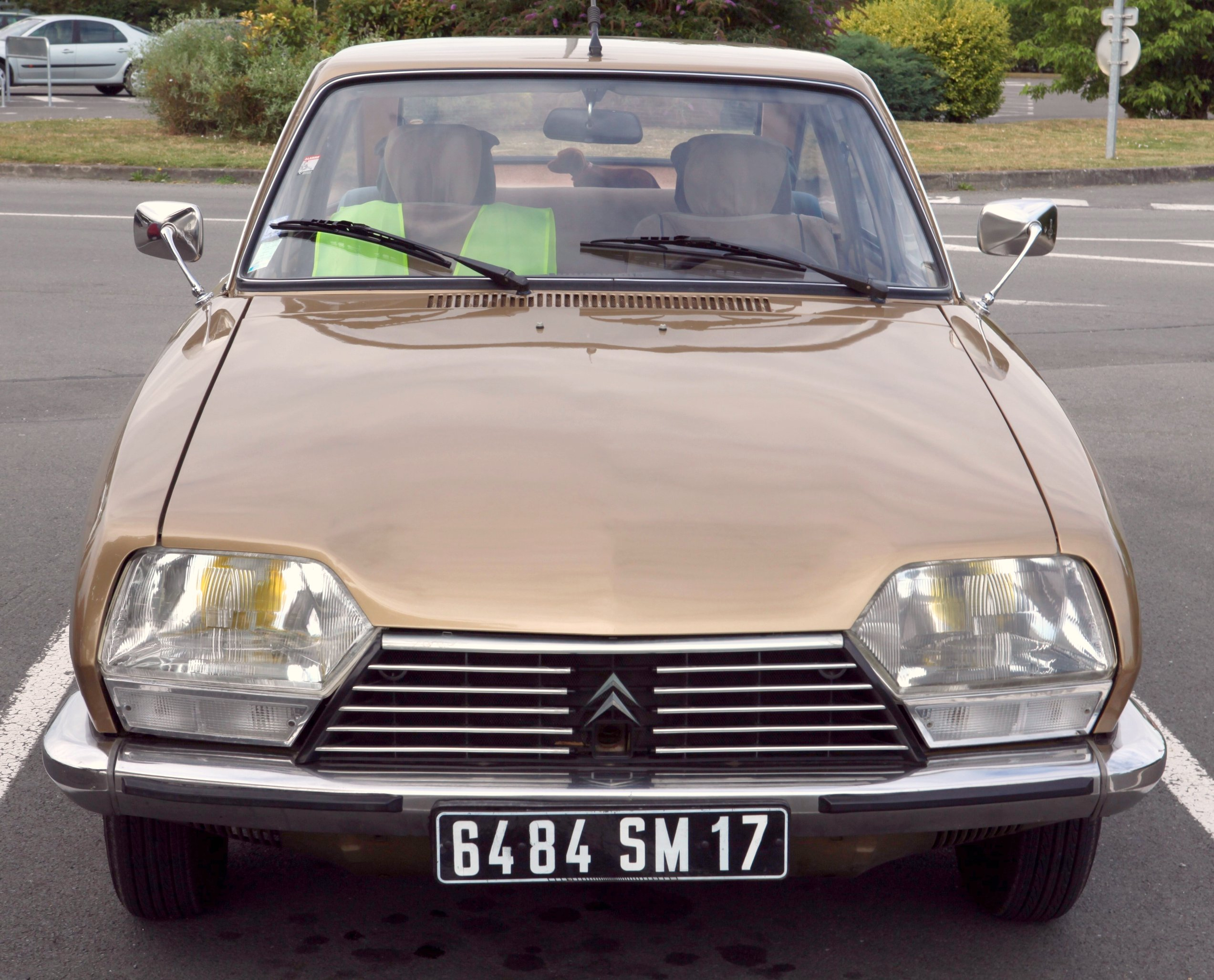 Citroen GS Pallas